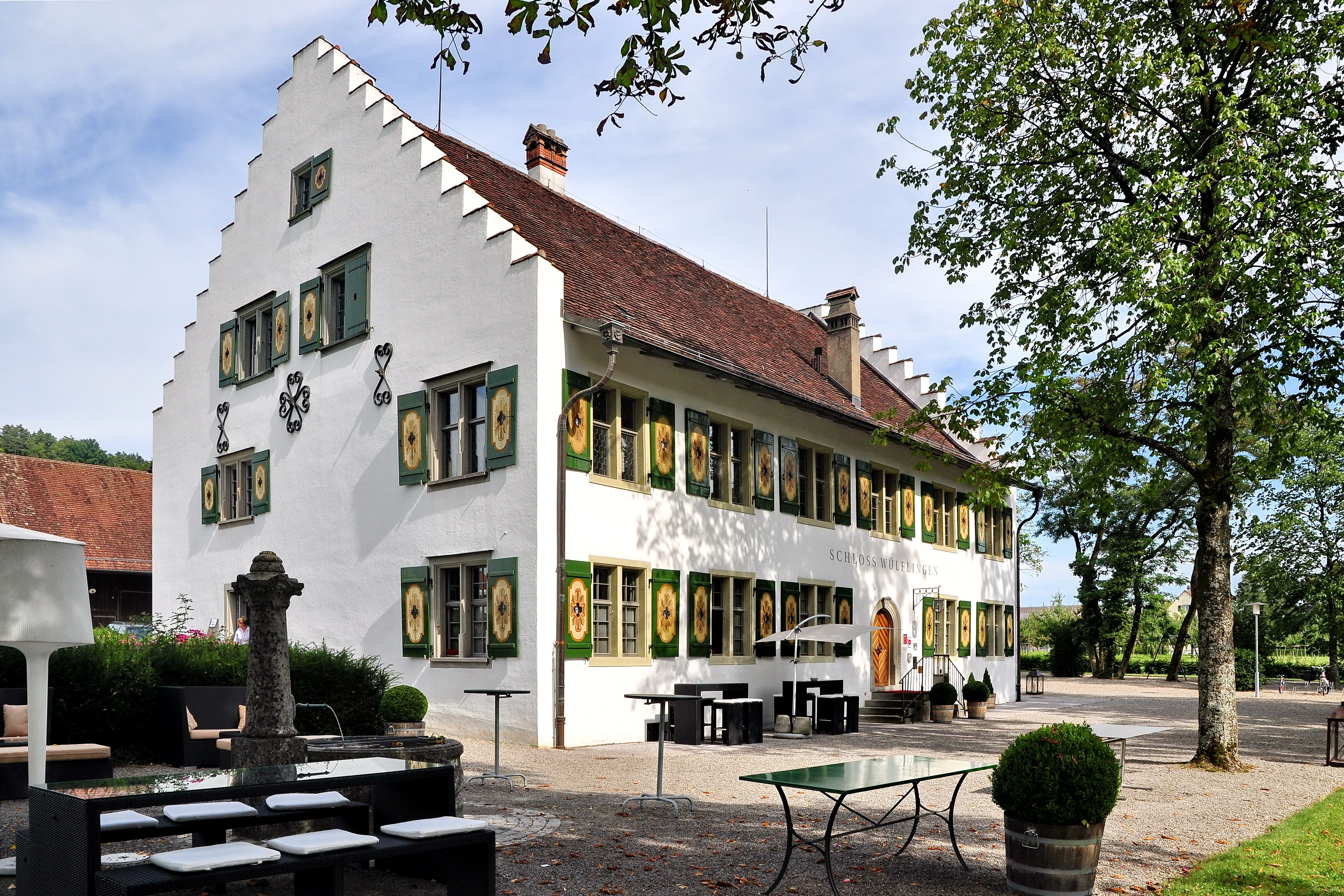 Schloss Wülflingen mit Waschhaus und Scheune, Wülflingerstrasse 214 in Winterthur (Switzerland)